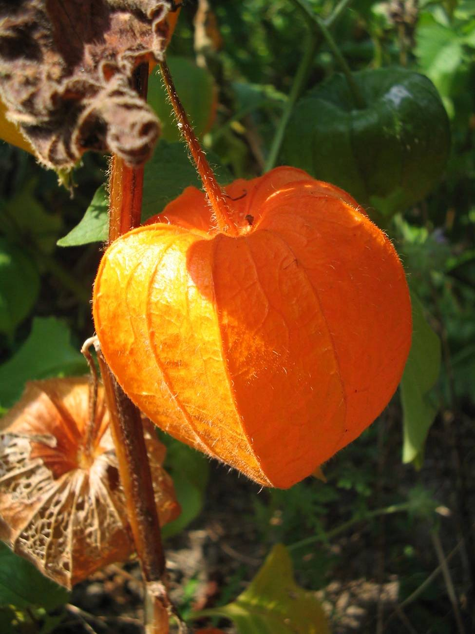 Physalis (Frucht)